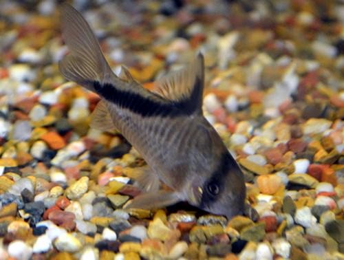 Corydoras melini